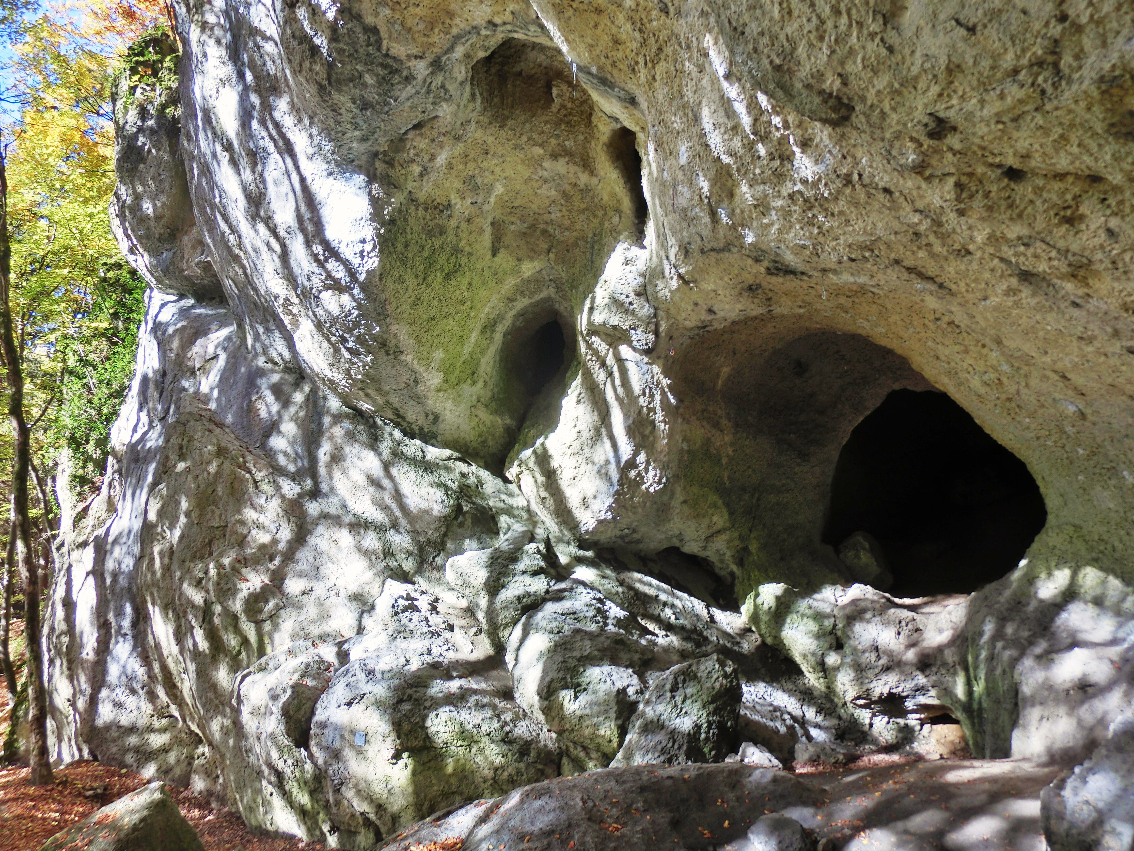 Silbergoldsteinhöhle – 10 Meter hohes und ebenso breites Höhlenportal